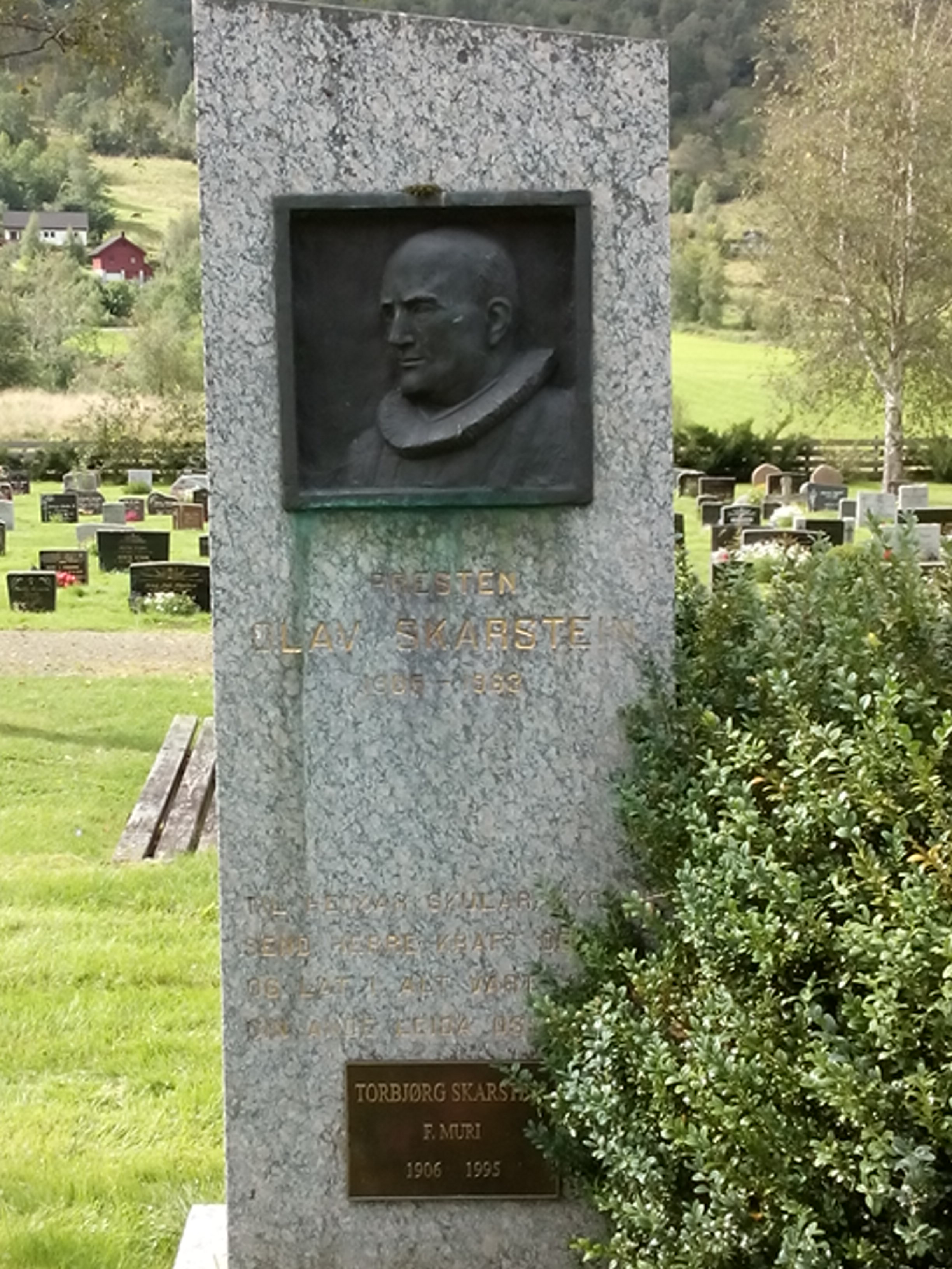 Gravsteinen til Olav Skarstein